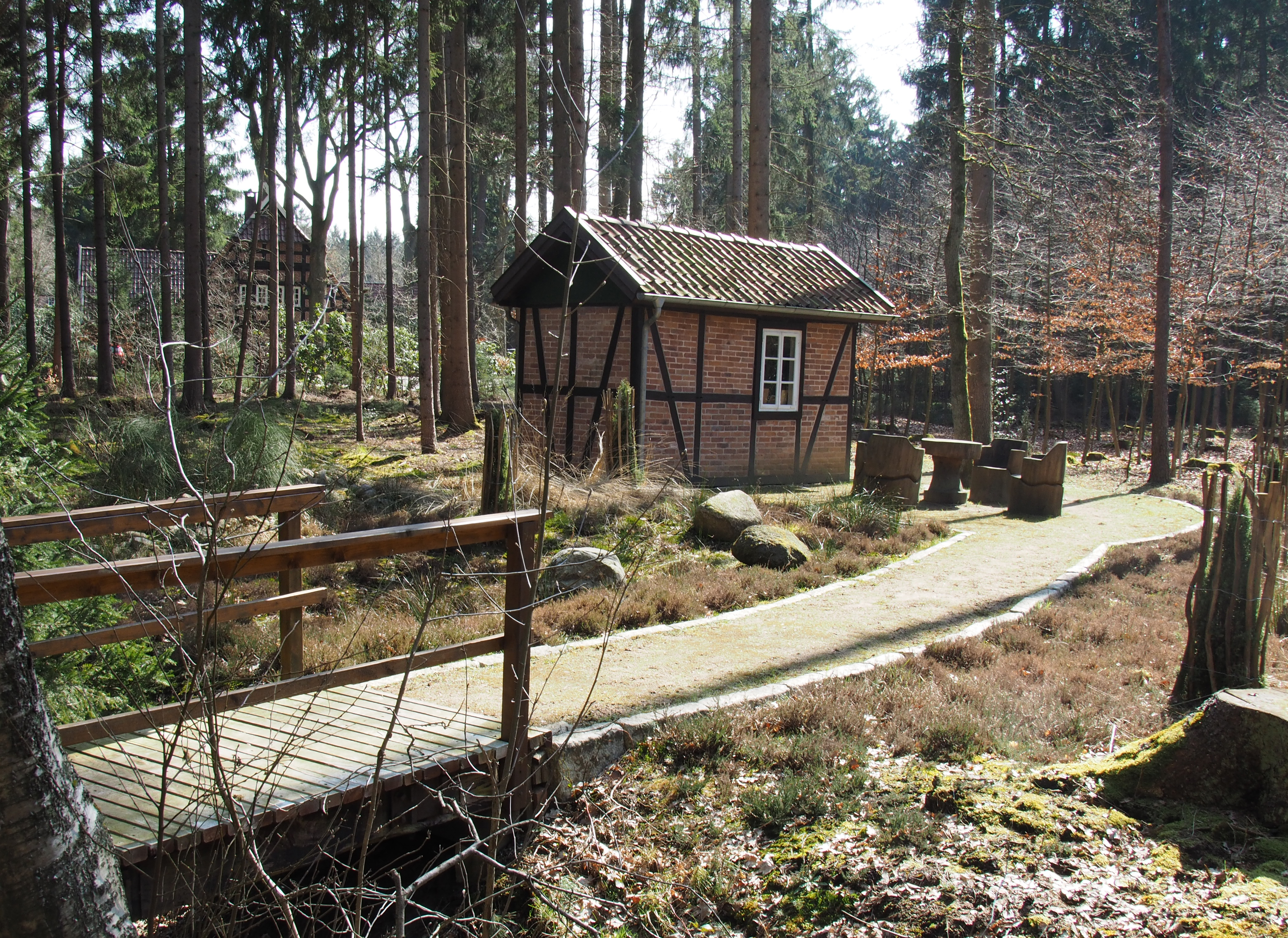 Lönshütte im Westenholzer Bruch, von Hermann Löns von 1898-1914 als Jagdhütte genutzt, ursprünglicher Standort Nahe dem Hansburs-Hof, etwa 650 Meter östlich